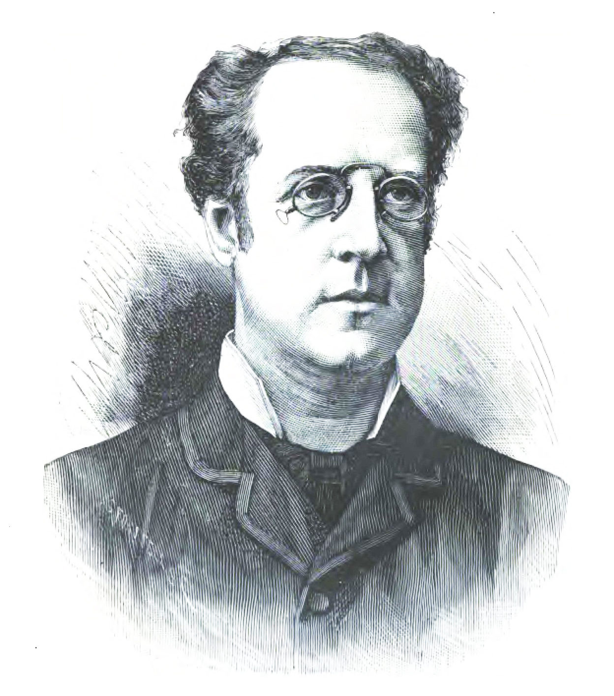 Pelle Janzon (1844-1889)